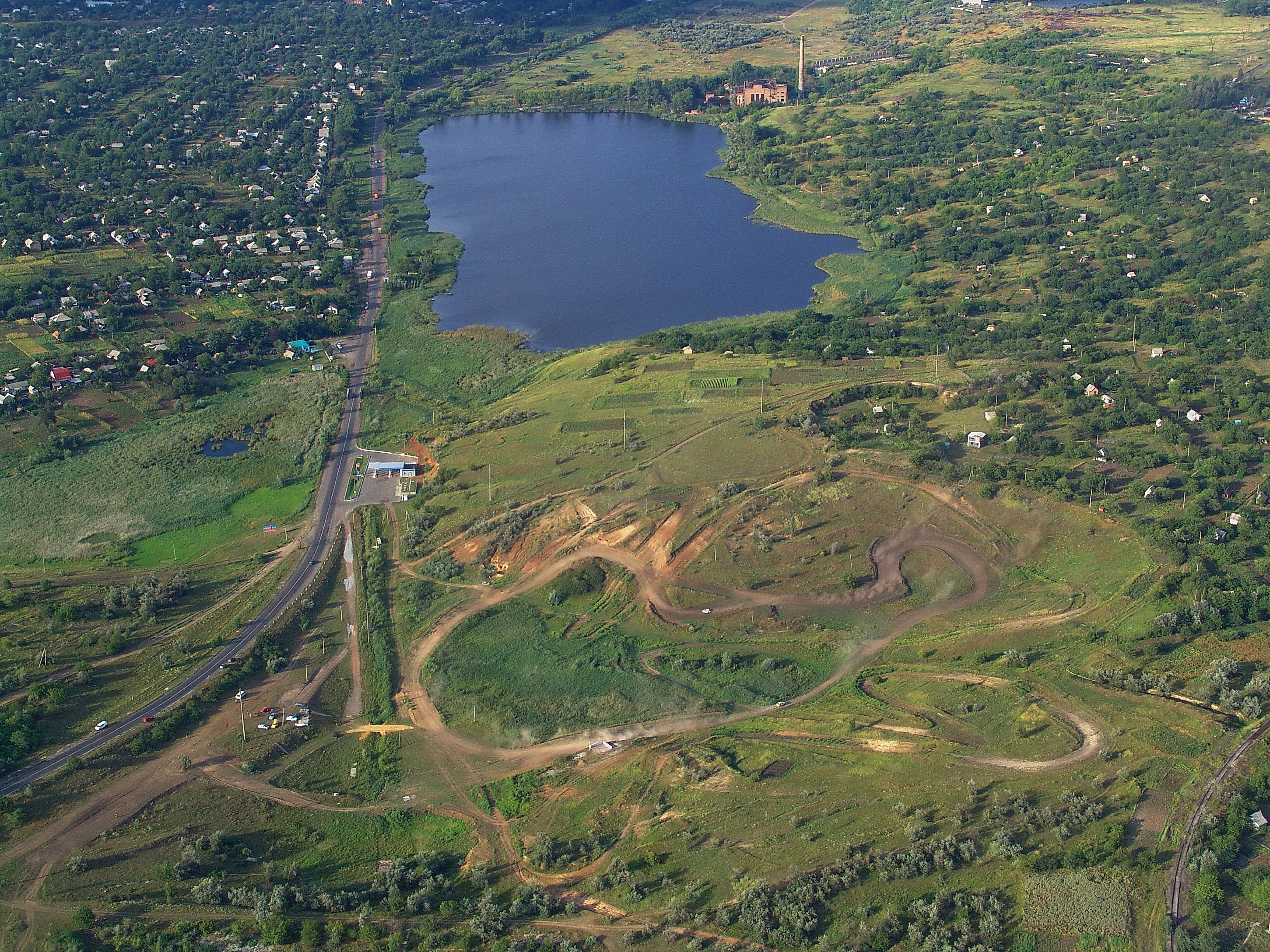 Траса «Вербова Лоза». Фото з вертольота. 15.08.2007